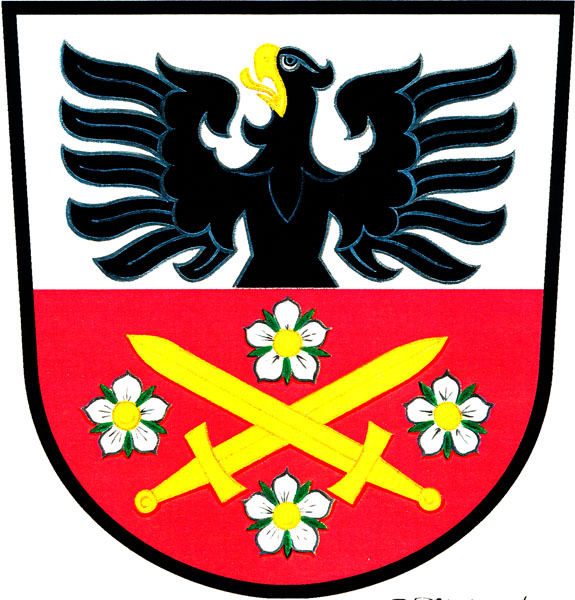 Znak obce Loděnice (okres Brno-venkov)